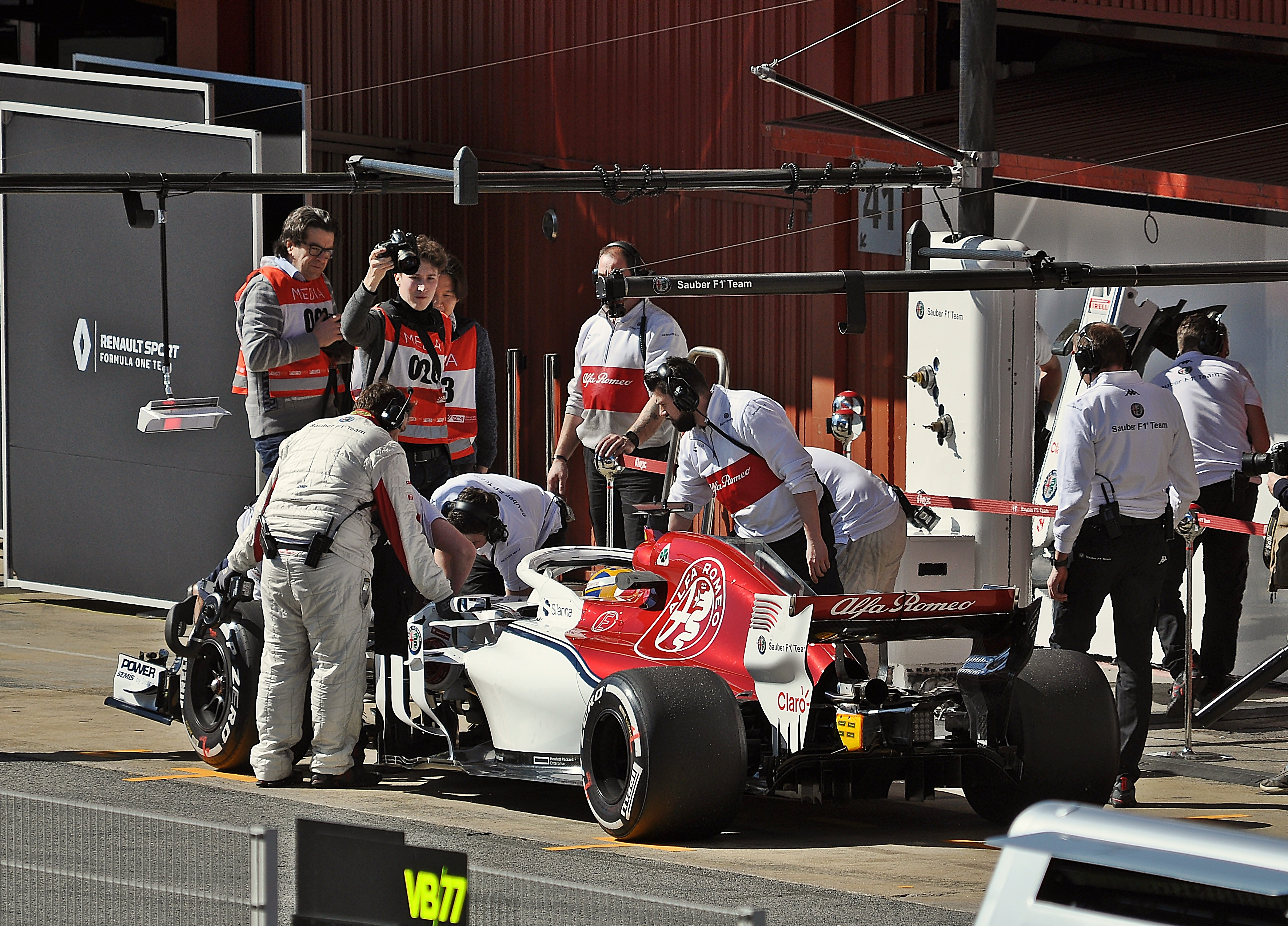 Sauber C37